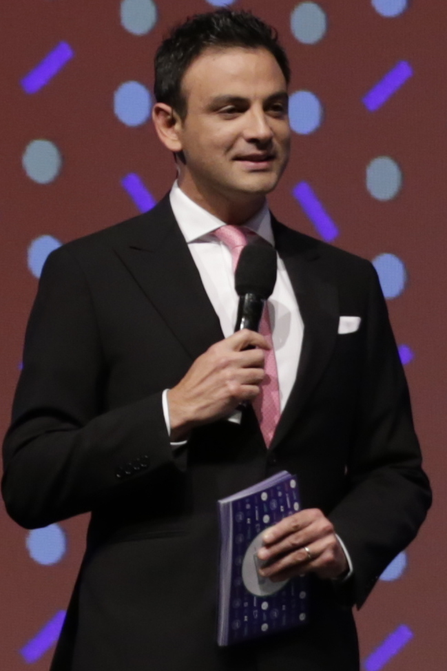 Gonzalo Ramírez y Carolina Escobar, periodistas chilenos, durante la Premiación Avonni 2017.